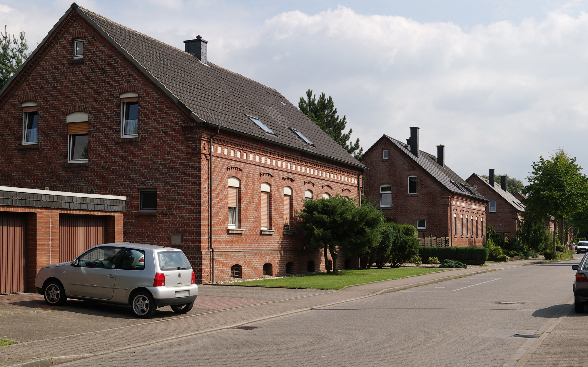 Bergarbeitersiedlung in Bergkamen-Rünthe, sog. D-Zug-Siedlung